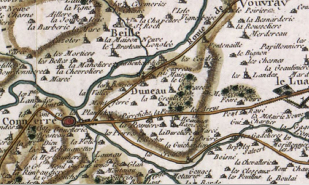 Extrait de la carte de César-François Cassini, commune de Duneau.